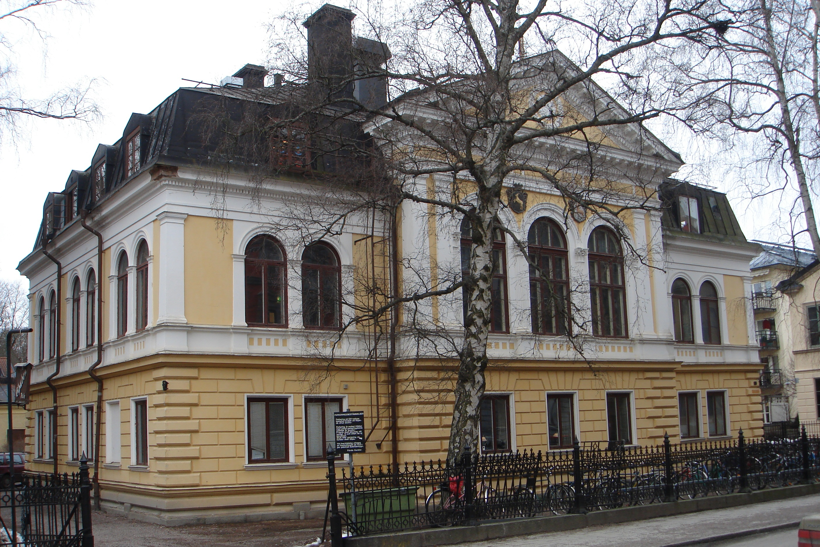 Gästrike-Hälsinge nation, Uppsala, Sweden